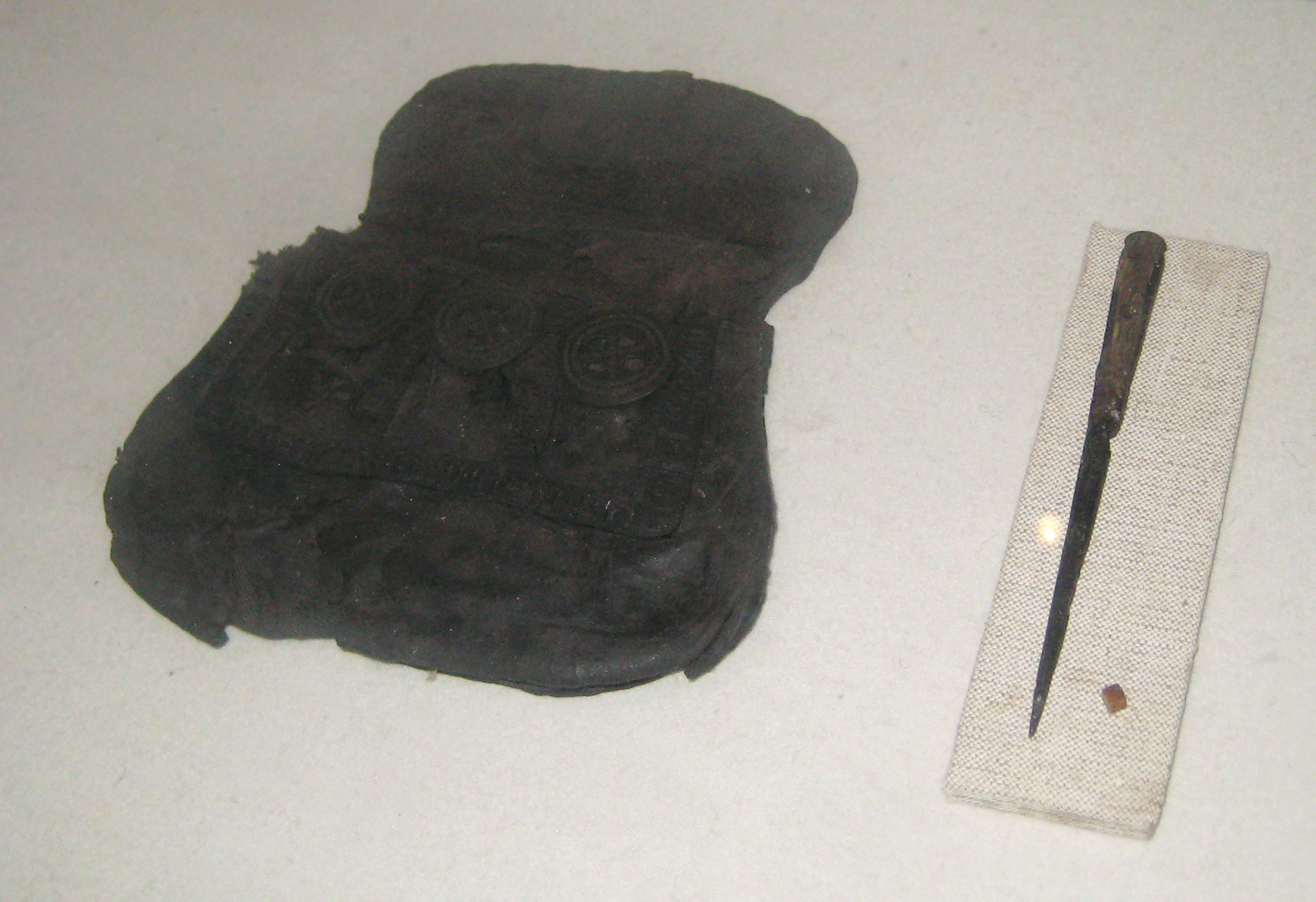 Находки из раскопок у Кутафьи-башни Московского Кремля. Сумка-калита с найденными в ней стилетом и игральной костью. Кожа, железо, дерево, кость. Музей Москвы (Провиантские склады)